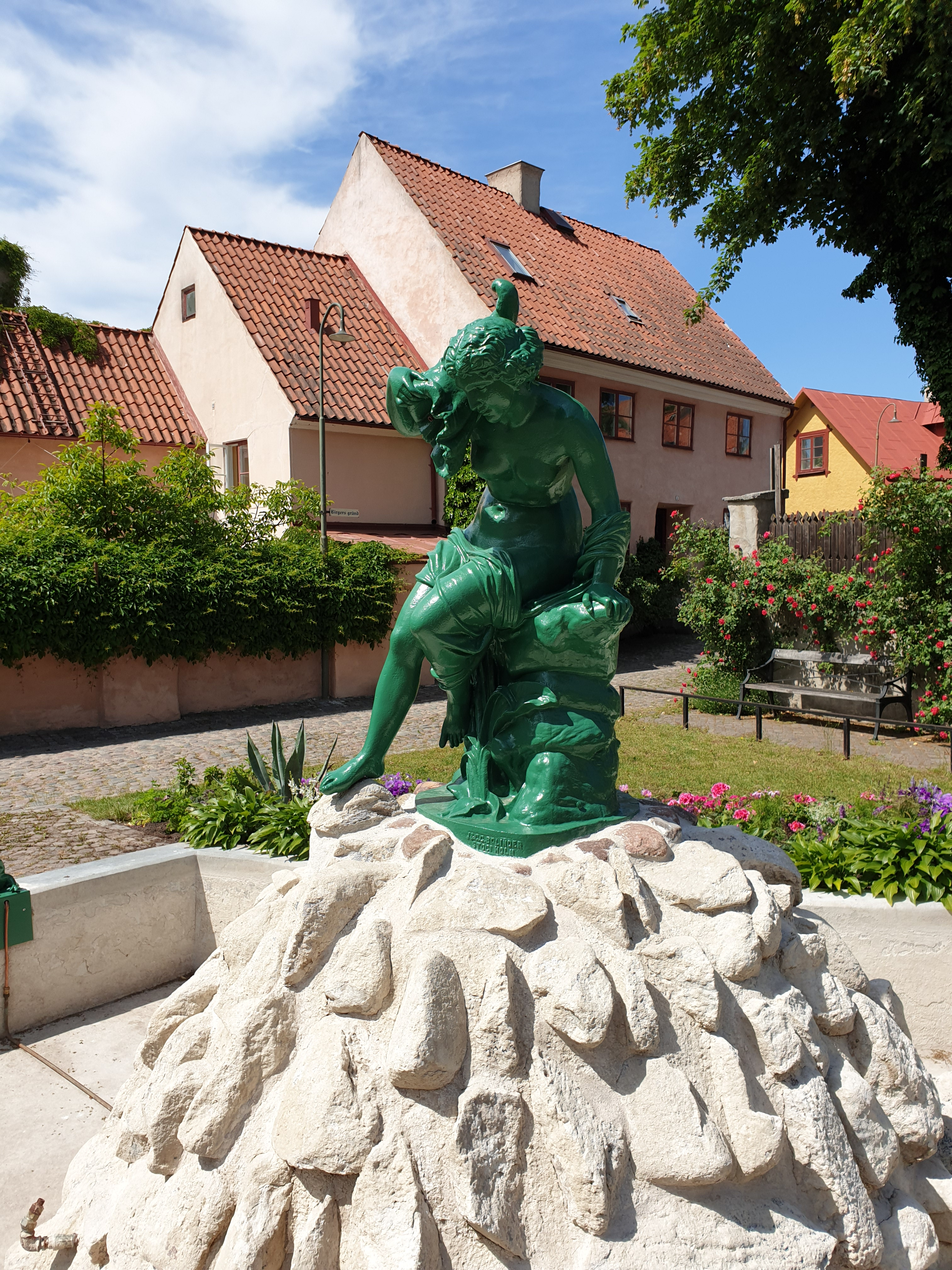 Nyrestaurerad